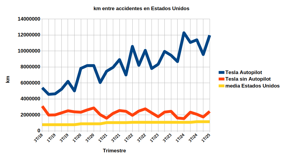 Gráfica de la estadística de accidentes graves en Estados Unidos. Compara la media nacional con los vehículos Tesla antiguos (sin sistemas AutoPilot), con los Tesla con sistemas de seguridad activa y con los Tesla con AutoPilot activado. Los datos proceden de la NHTSA y los publica trimestralmente Tesla en La gráfica se produce en una hoja de cálculo LibreOffice convirtiendo millas a kilómetros.